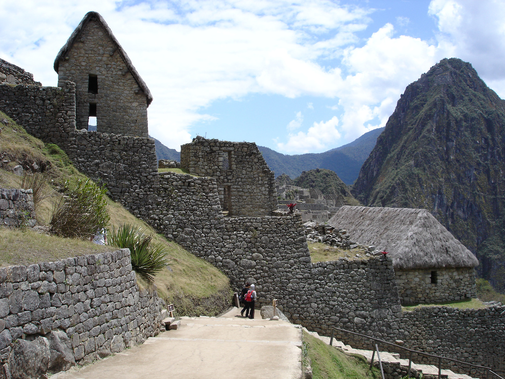 Machu Picchu, Peru.